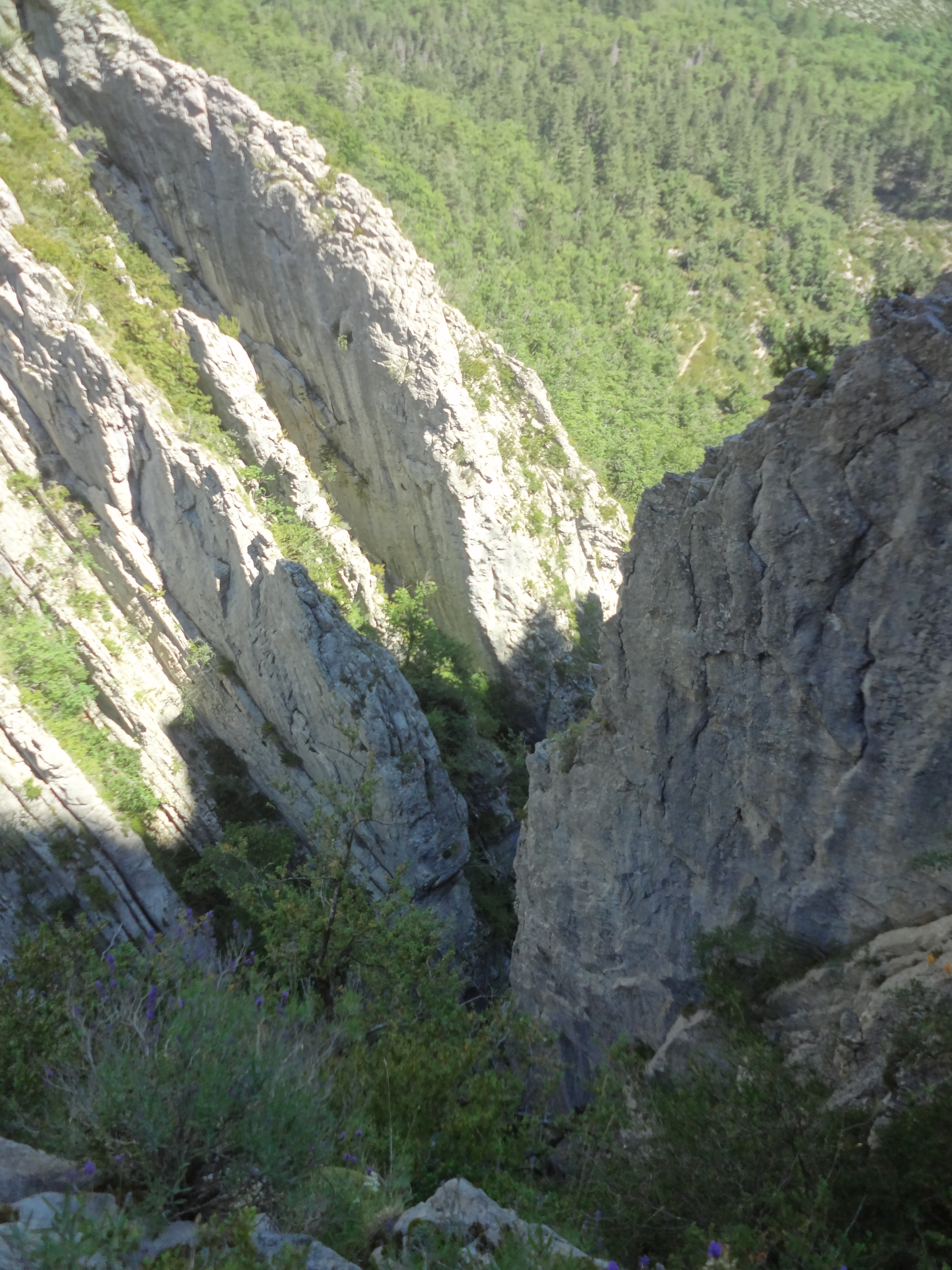 Téléchargée avec Commonist 0.9.1 Cluse de La Melle, entre Senez et Blieux (côté Blieux)